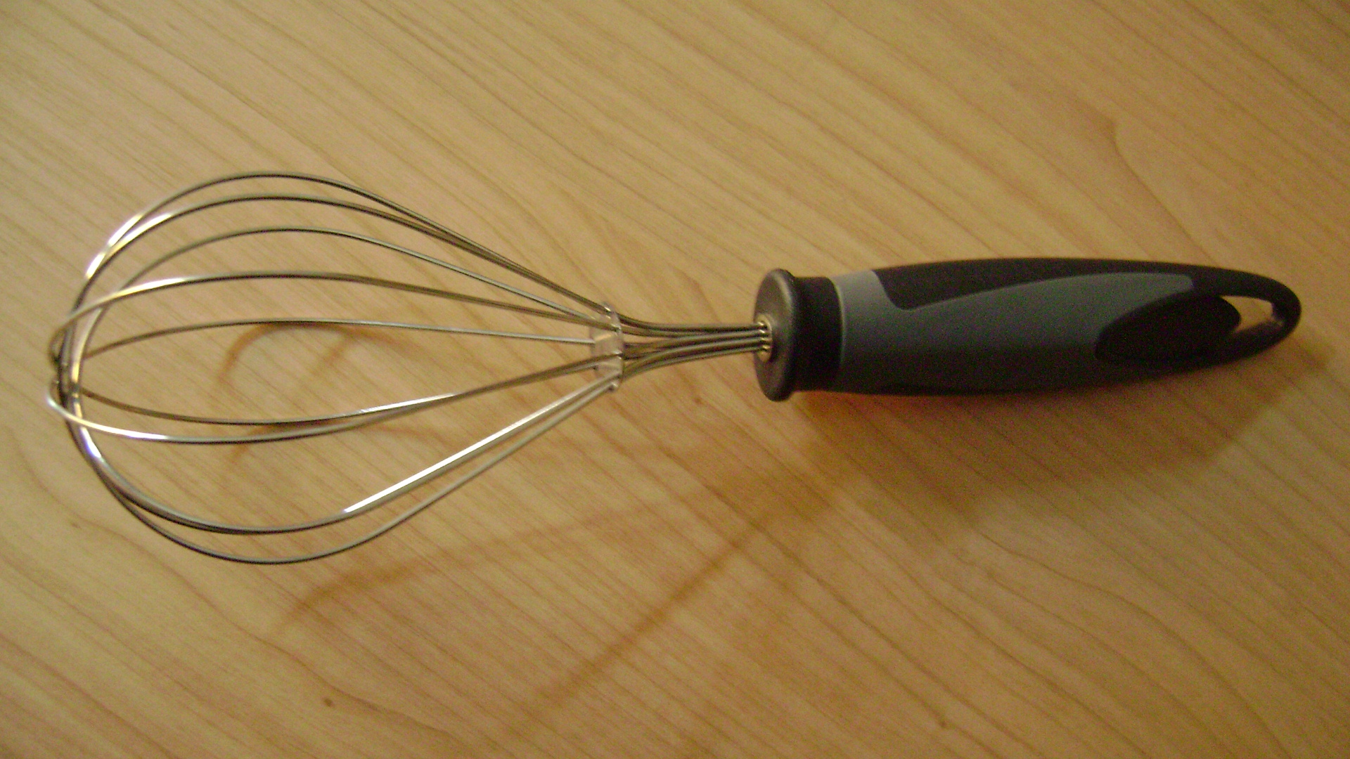 Una frusta da cucina